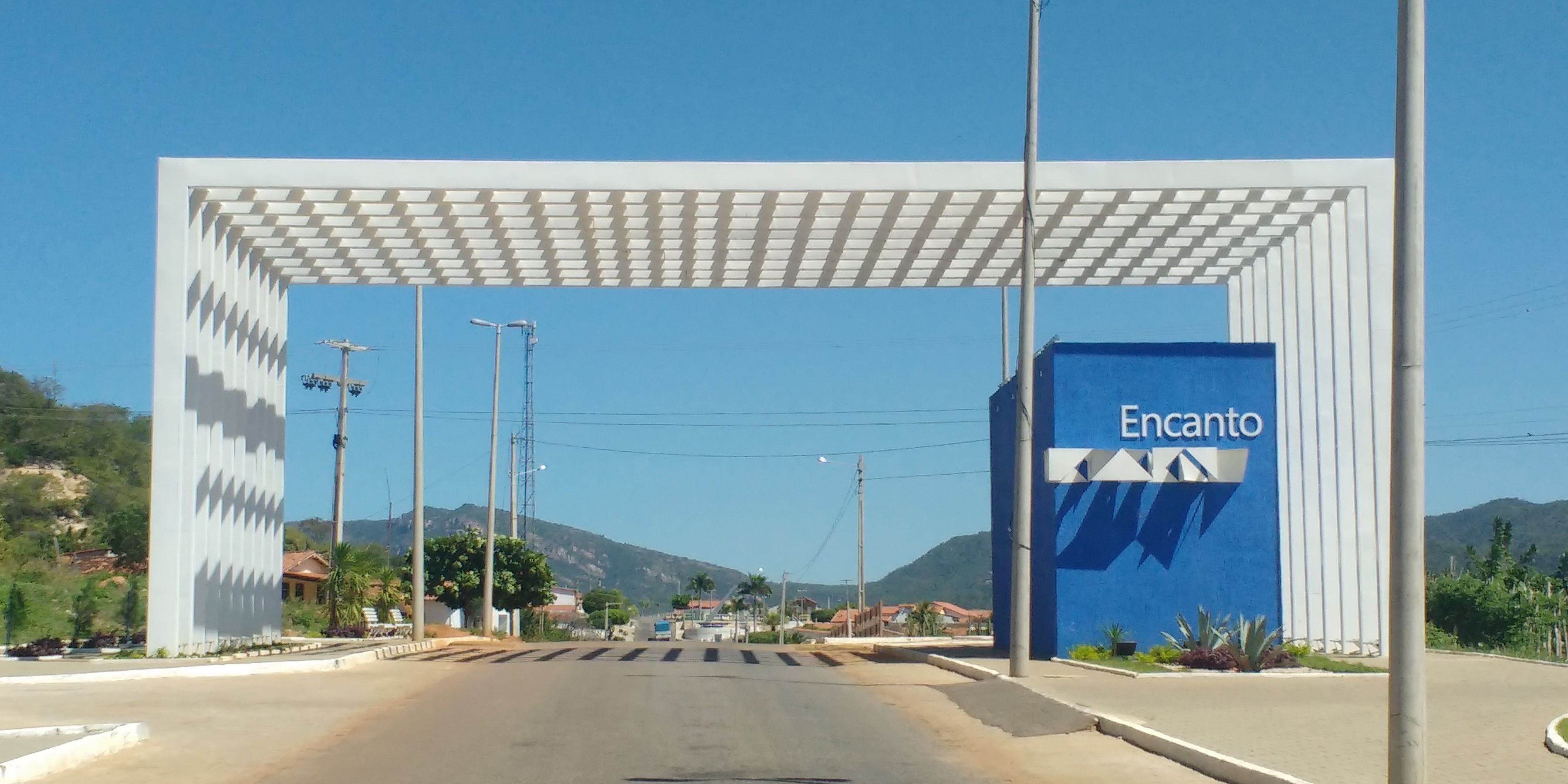 Pórtico de entrada da cidade do Encanto, Rio Grande do Norte (Brasil), às margens da rodovia RN-177.